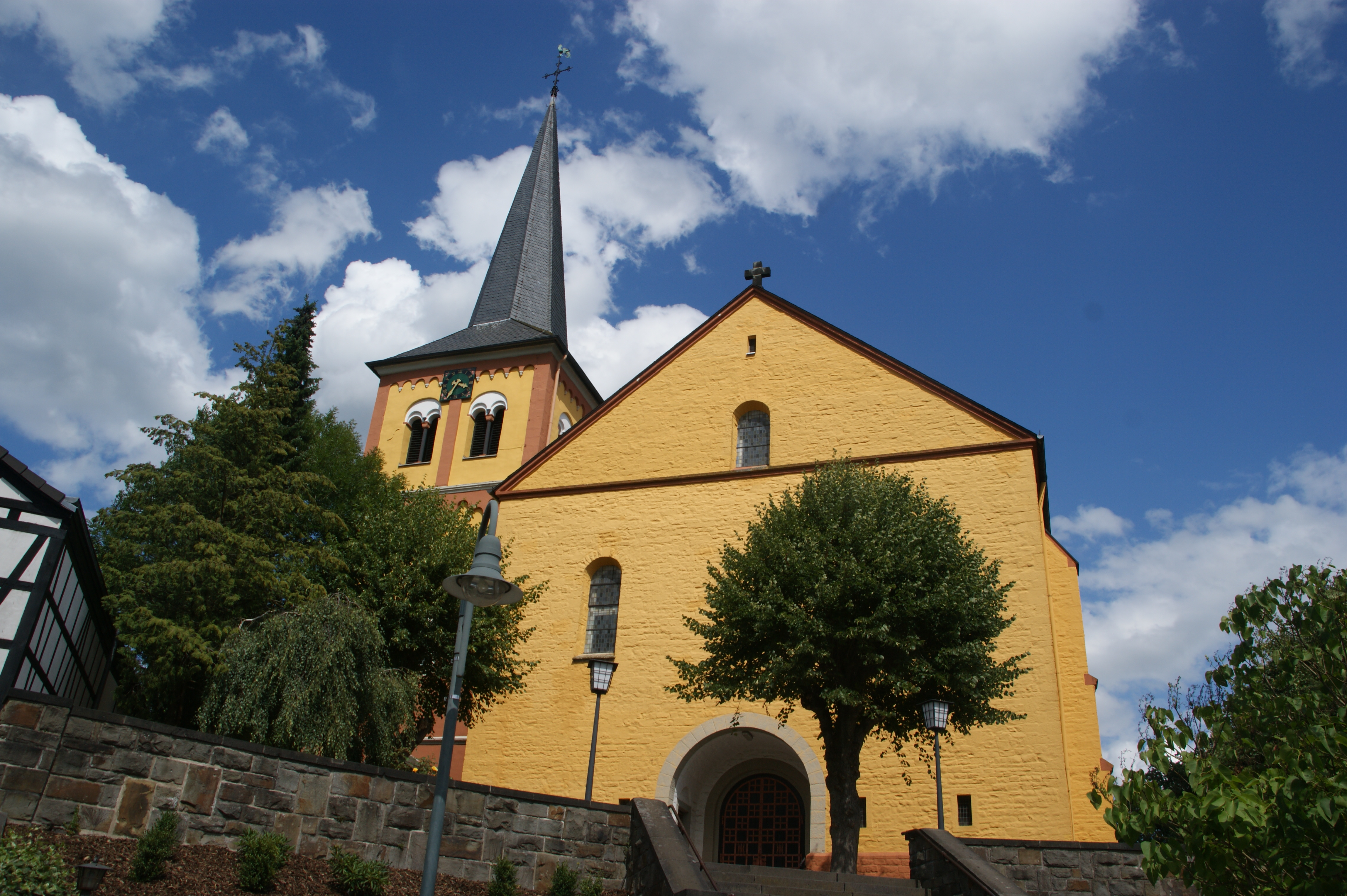 Katholische Kirche St. Laurentius in Asbach